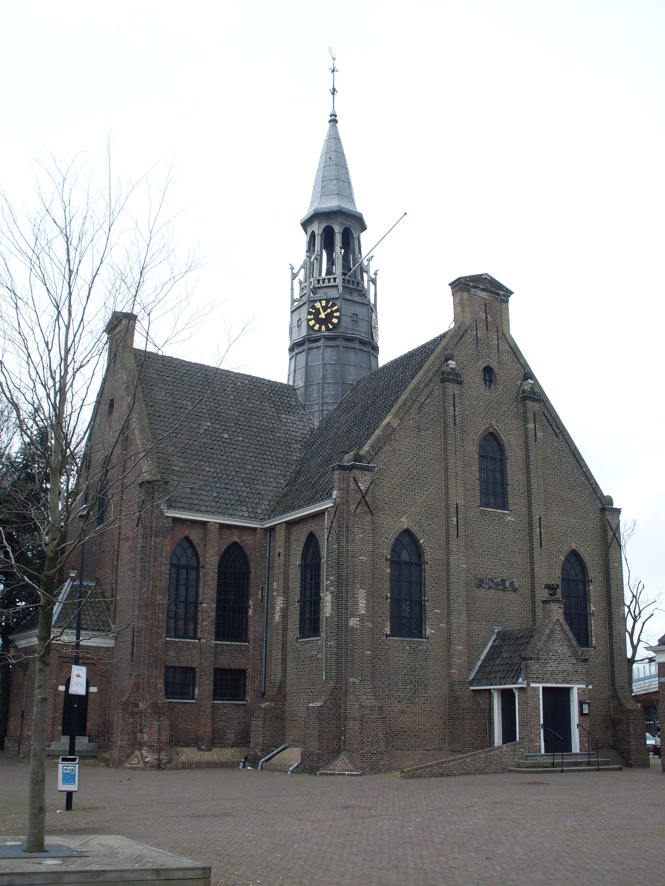 Hervormde kerk te Koog.